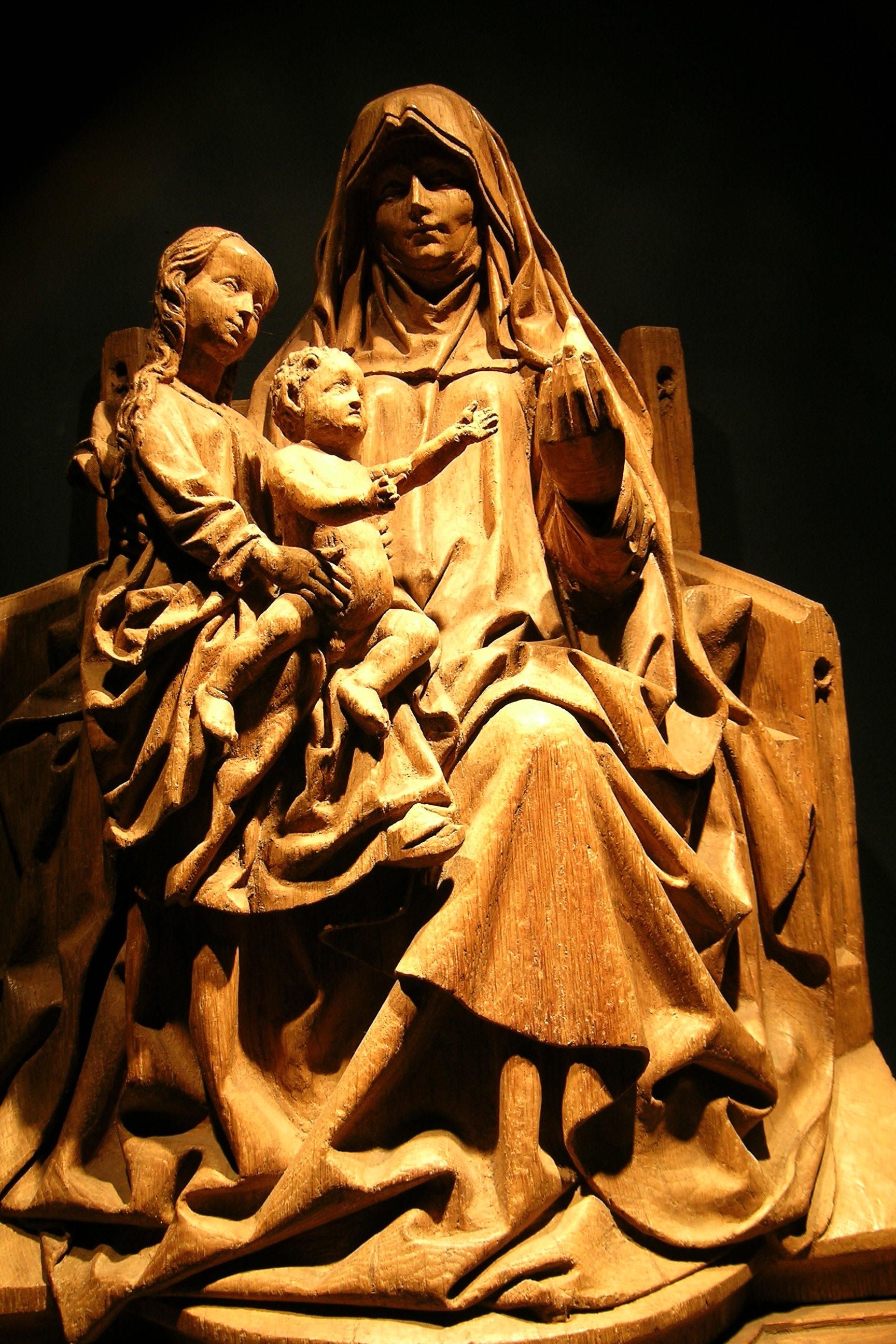 eigene Arbeit